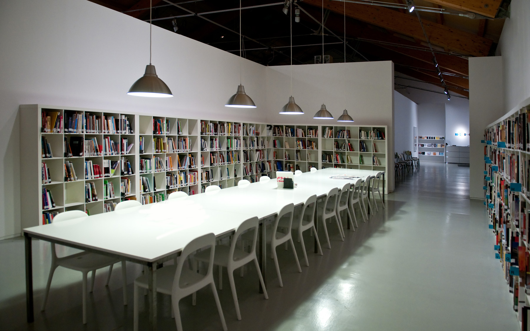 Centre de Documentació del Centre d'Art la Panera de Lleida